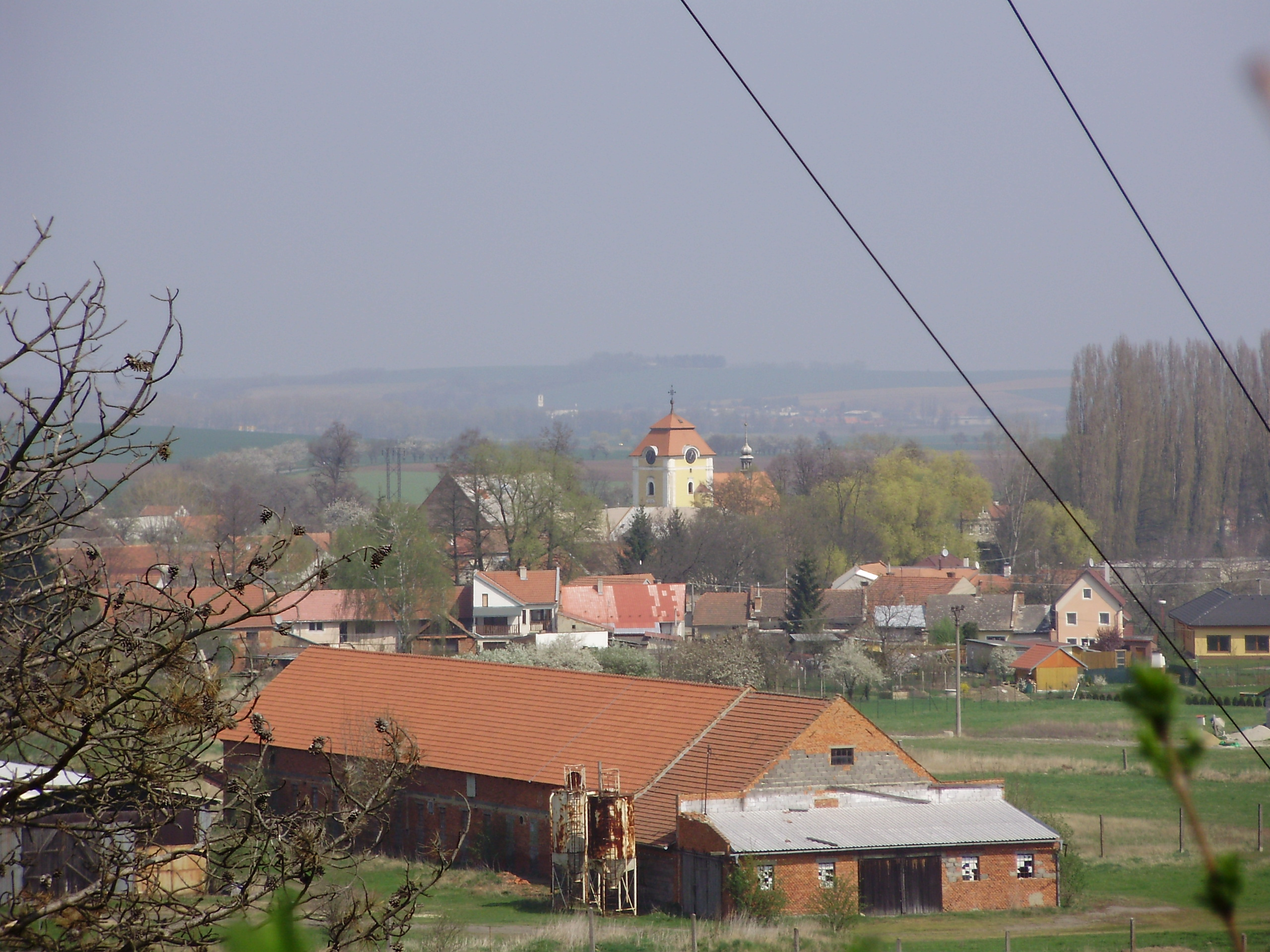 Mostkovice